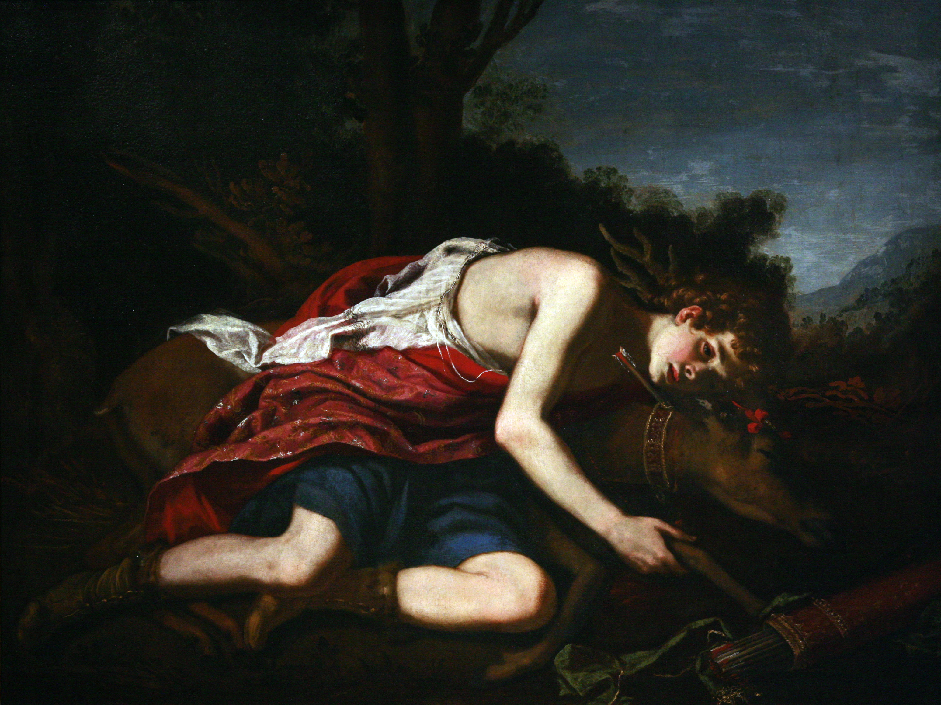 Cyparissus